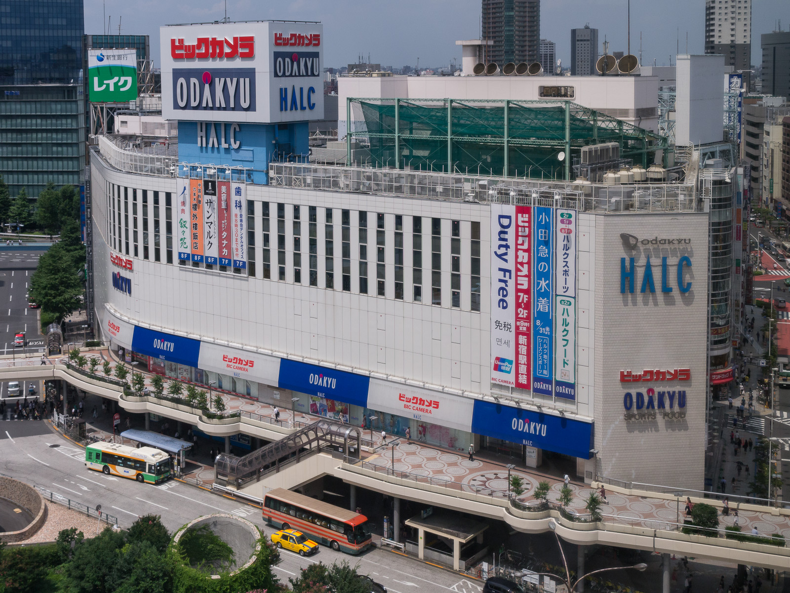 小田急ハルク、ビックカメラ新宿西口店。